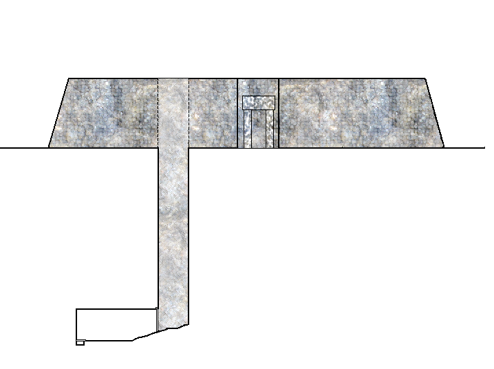 Mastaba